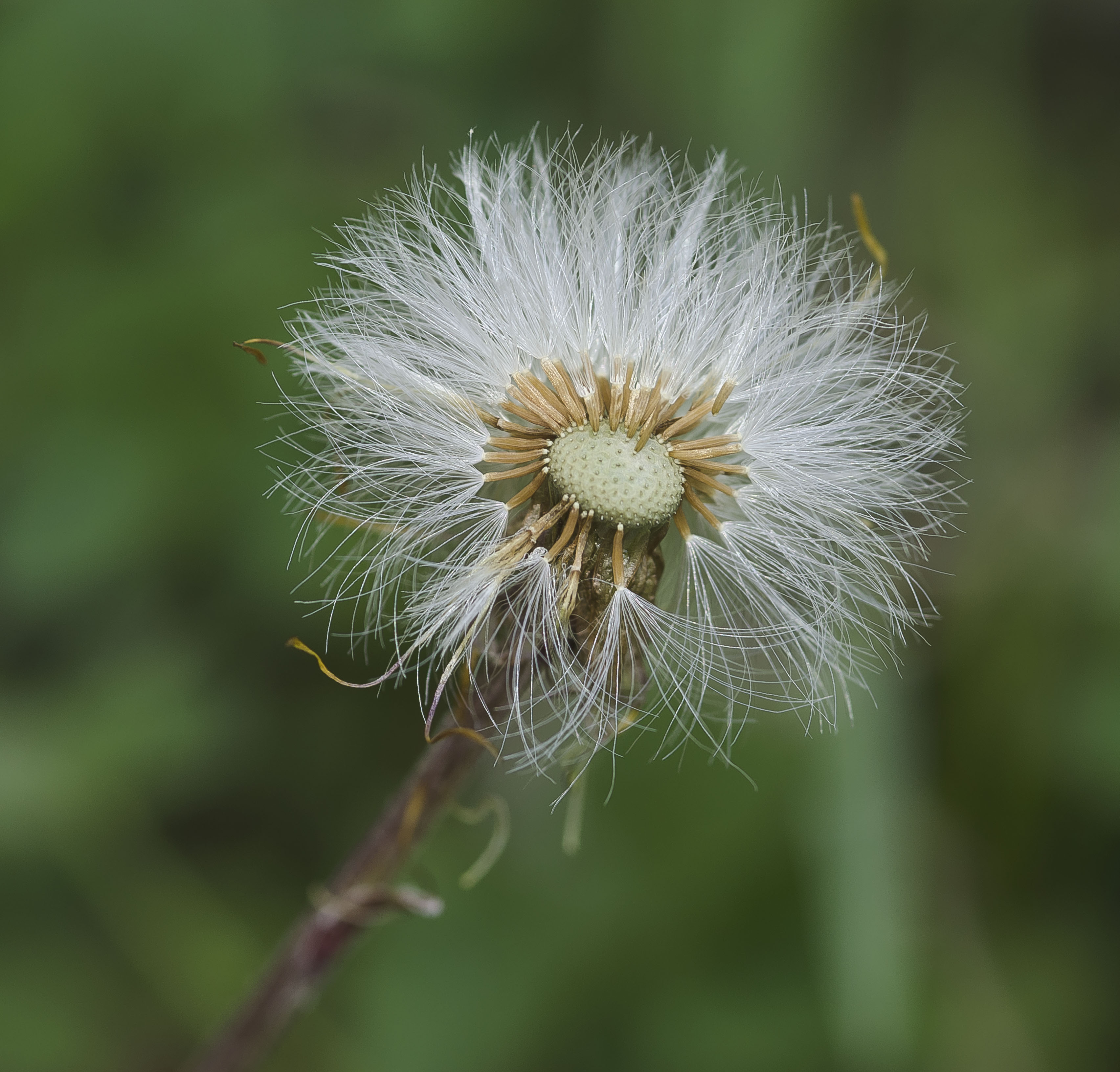 Huflattich (Tussilago farfara), Fruchtstand, aufgenommen bei Stuttgart. Dank an die Mitglieder von Wikipedia:RBIO/B für die Bestimmung.